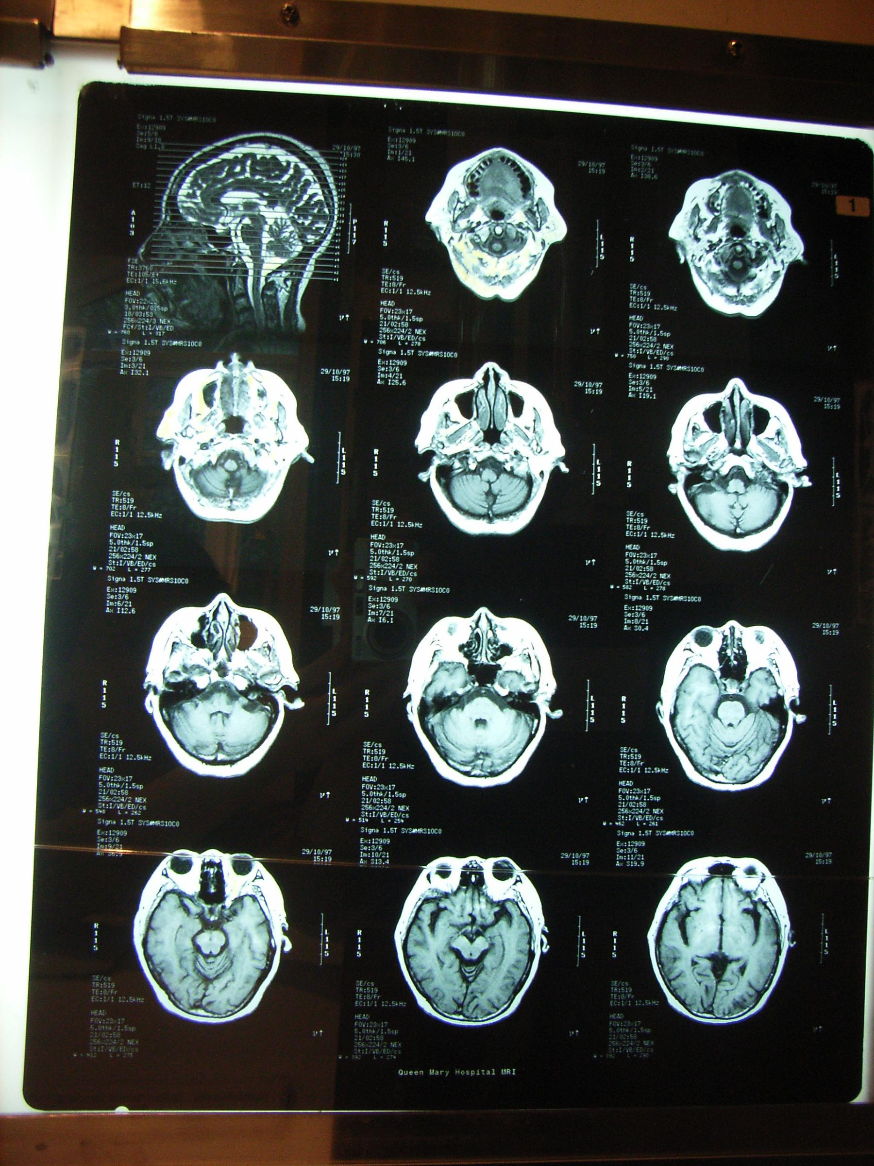 香港公共醫療歷史